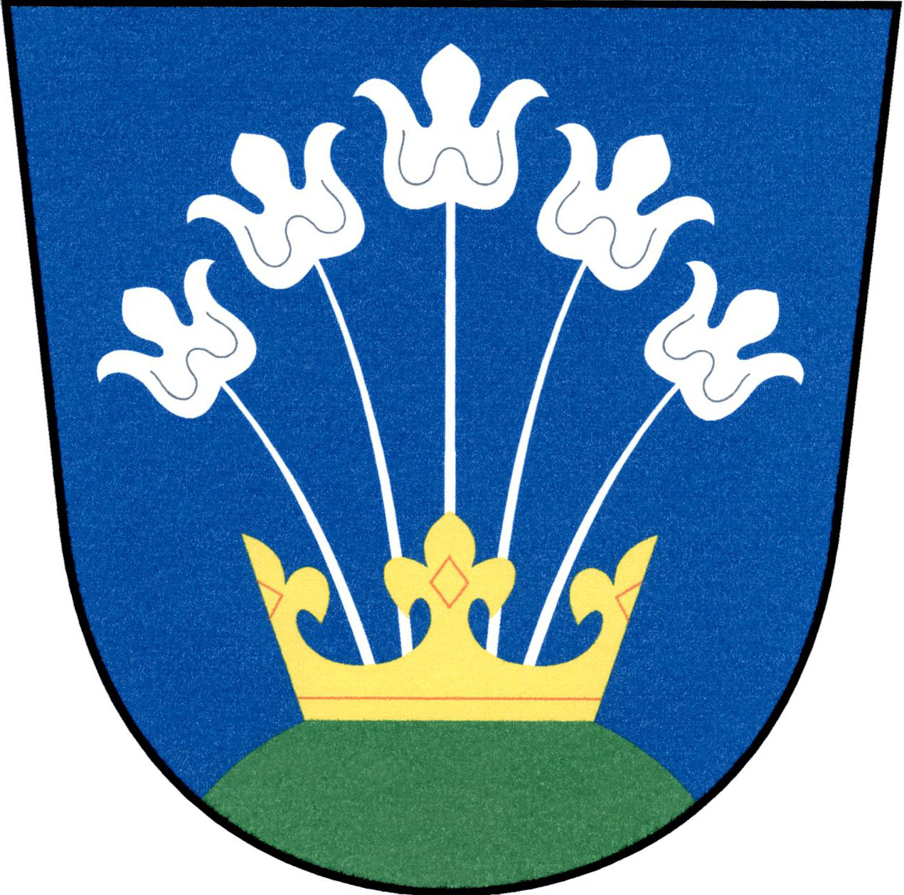 Vyškovec,_znak